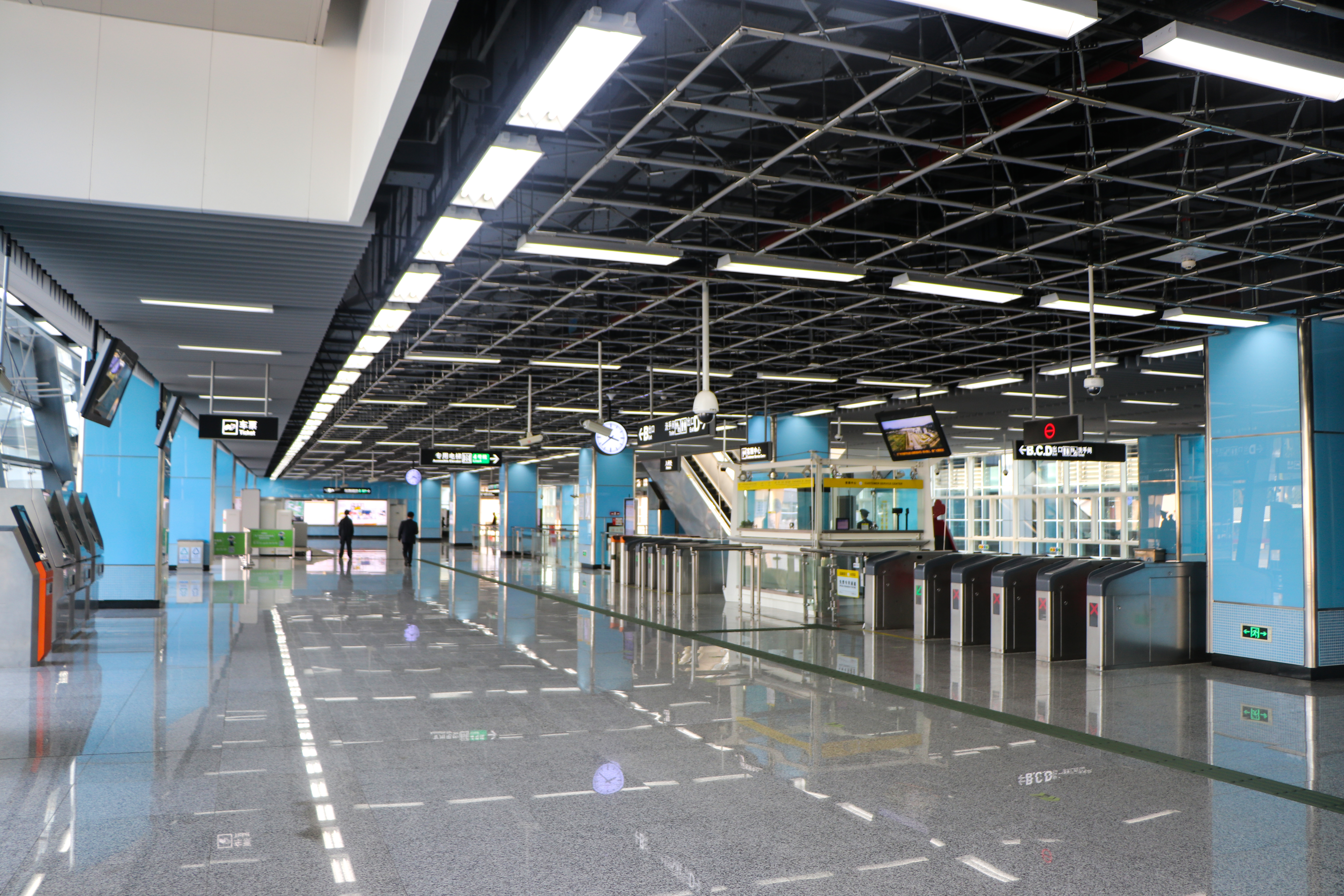 广州地铁庆盛站